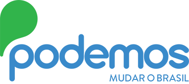 Logomarca do Partido Podemos atualizada no ano de 2017.